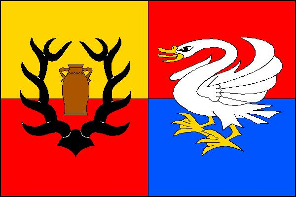 Vlajka obce Horní Kozolupy